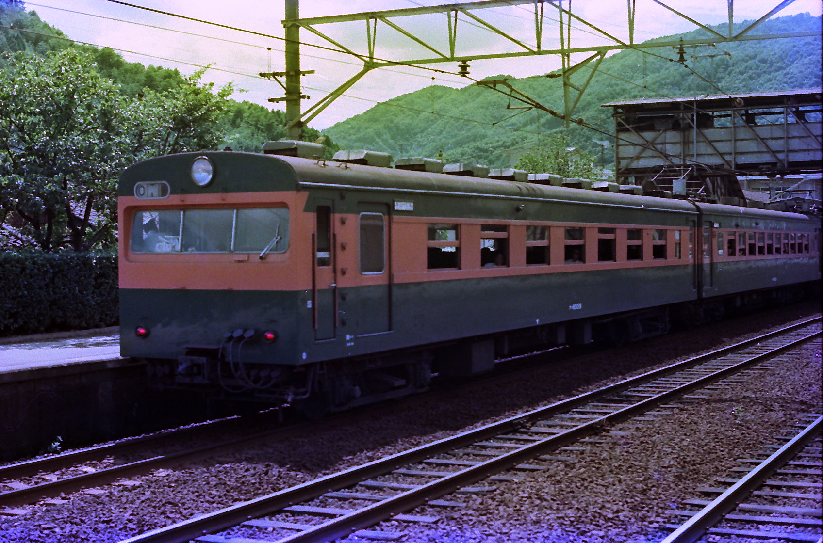 山陽本線 瀬野駅に停車中の80系電車